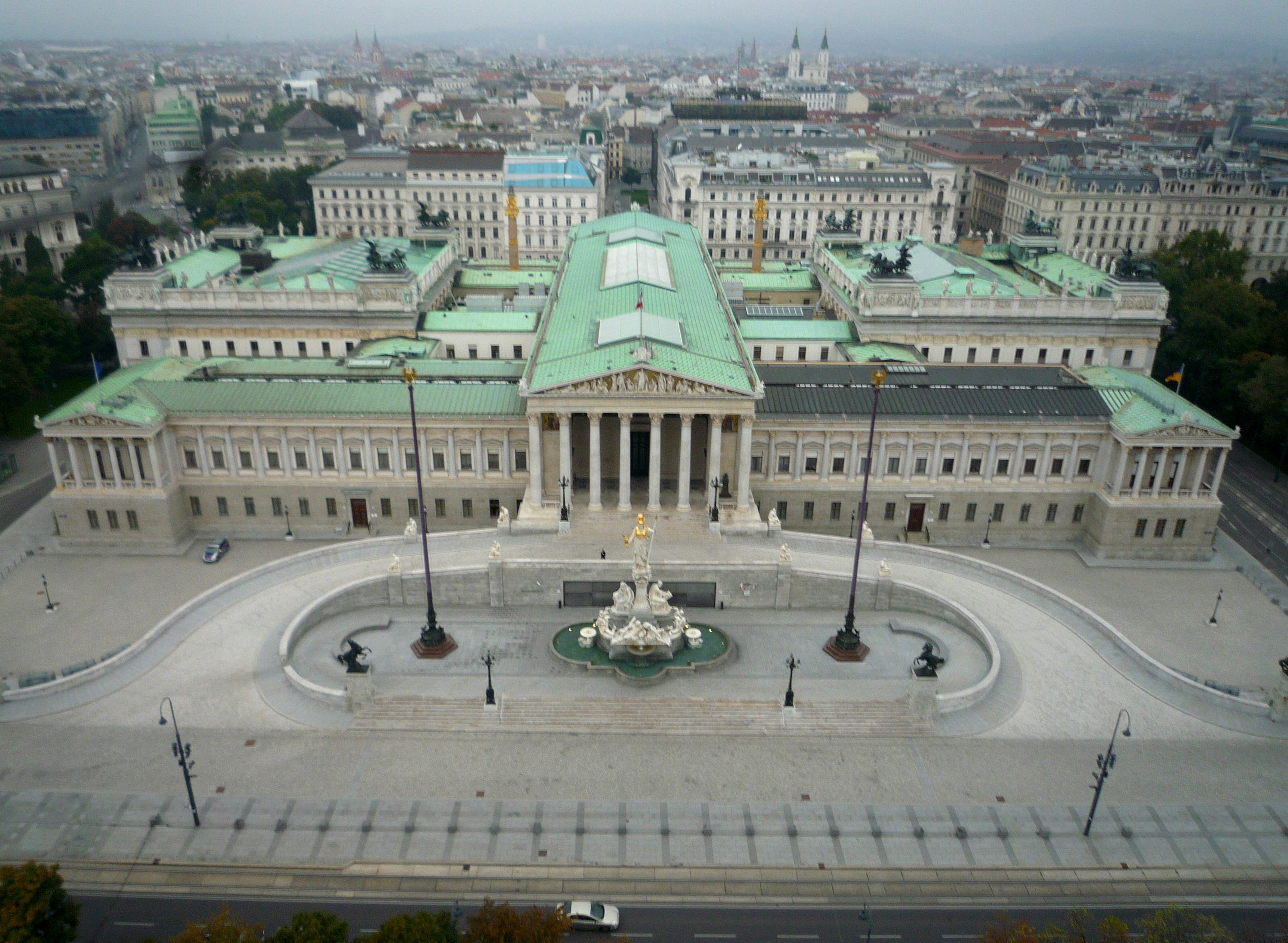 Parlamentsgebäude